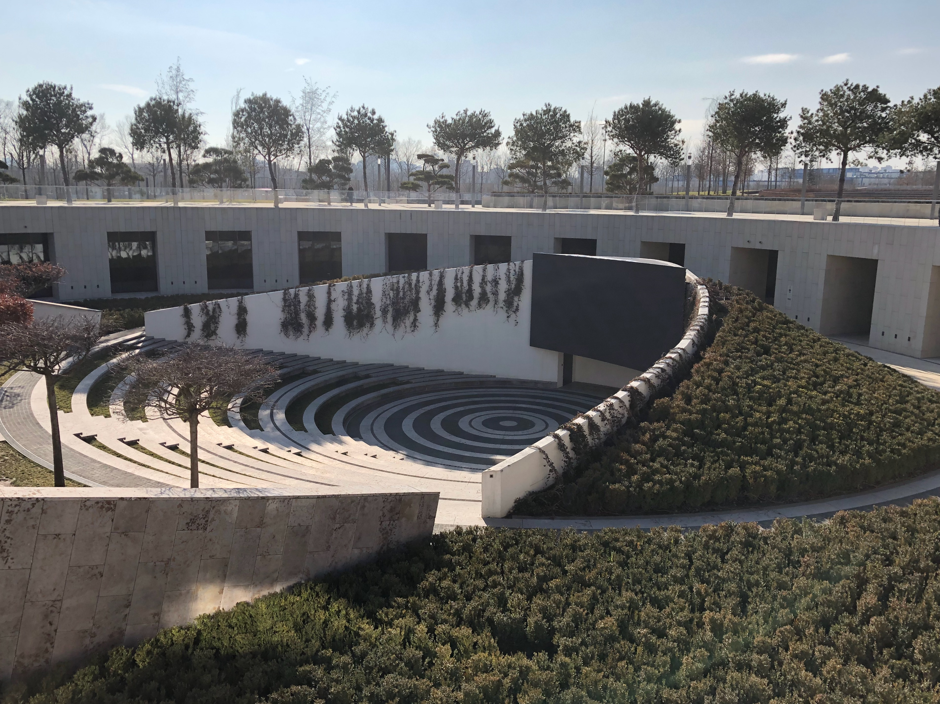 Парк Галицкого